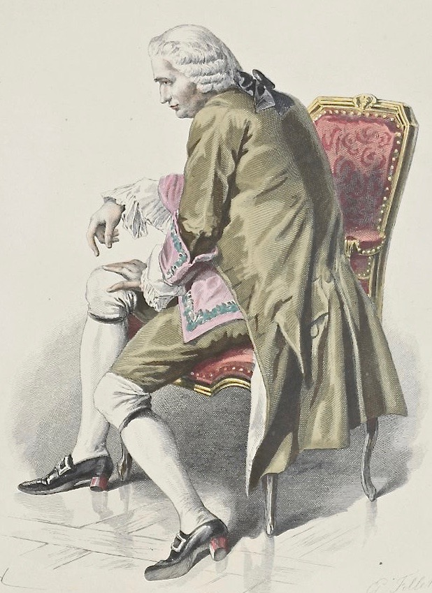 Émile Bayard (1837–1891): Mélac père. Illustration zu Pierre-Augustin Caron de Beaumarchais (1732–1799): Les deux amis (1770). Aus: Oeuvres complètes de Beaumarchais, hrsg. v. Édouard Fournier, Paris 1876, S. 46/47. Bibliothèque nationale de France.